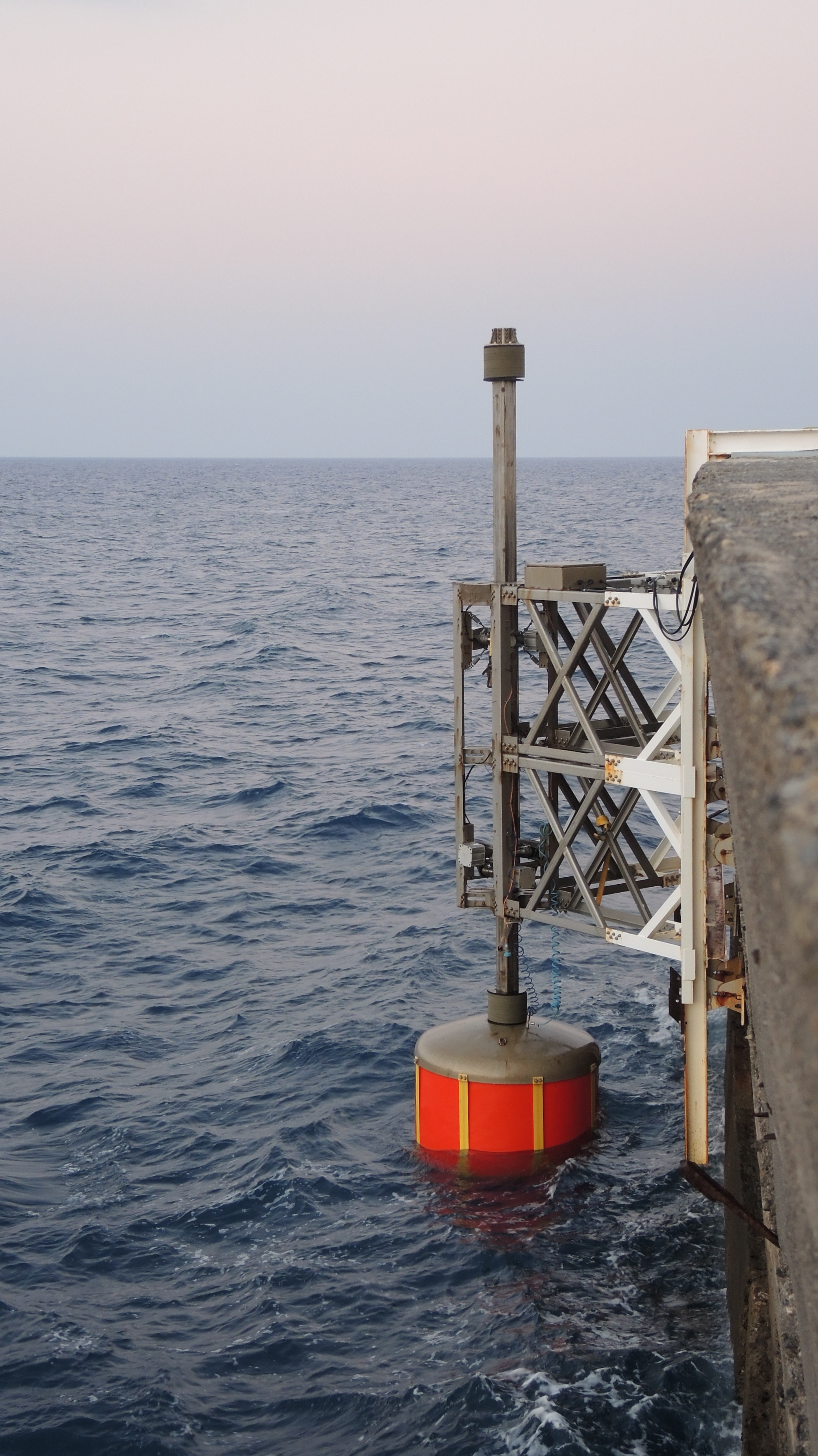 Prototyp eins SINN Power Wellenkraftwerks-Moduls auf Kreta im August 2016